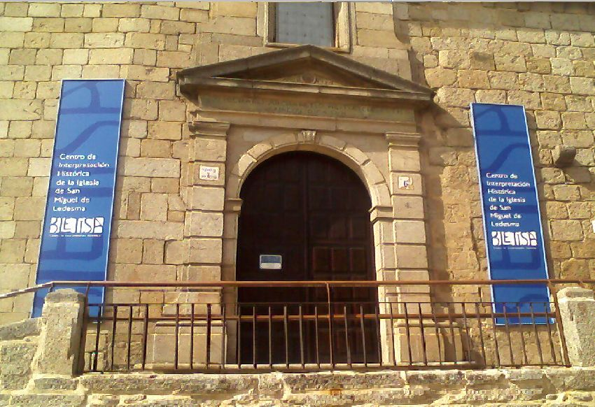 Portada de la iglesia de San Miguel de Ledesma, que en la actualidad alberga en Centro de Interpretación histórica de la iglesia de San Miguel de Ledesma, provincia de Salamanca, (España).